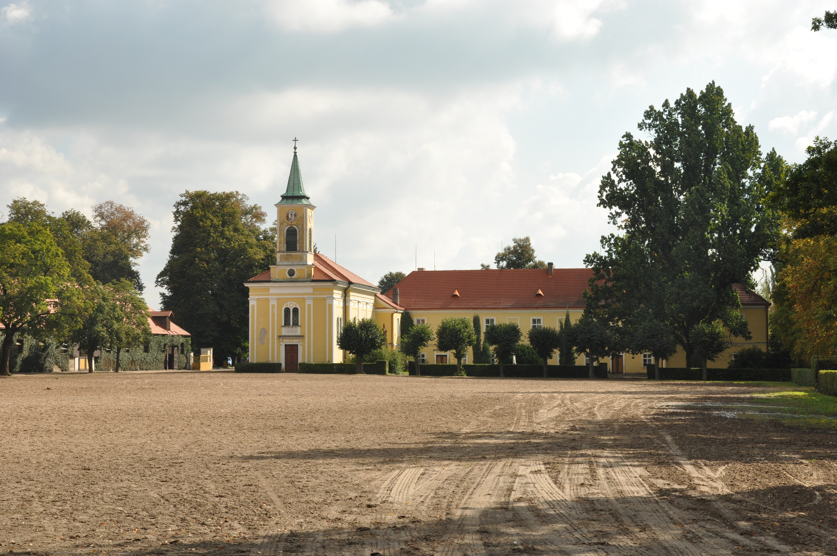 Hřebčín - areál (zámek, kostel sv. Václava, kostel sv. Kříže, stáje, viz spis) Kladruby nad Labem, k. ú. Kladruby nad Labem, Selmice, Hlavečník, Semín 1, Kladruby nad Labem